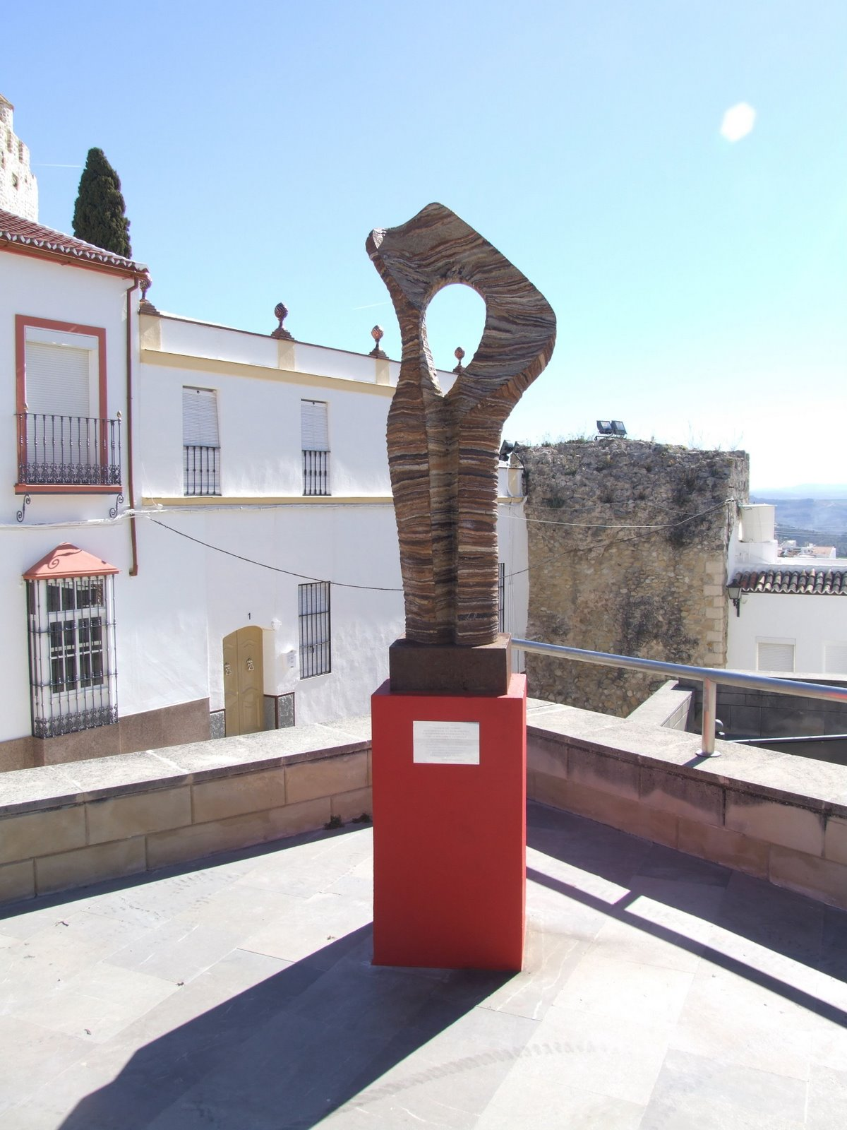 Monumento a los caídos en la guerra civil, Olvera